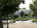 Vue du parc de l'Espace Béraire